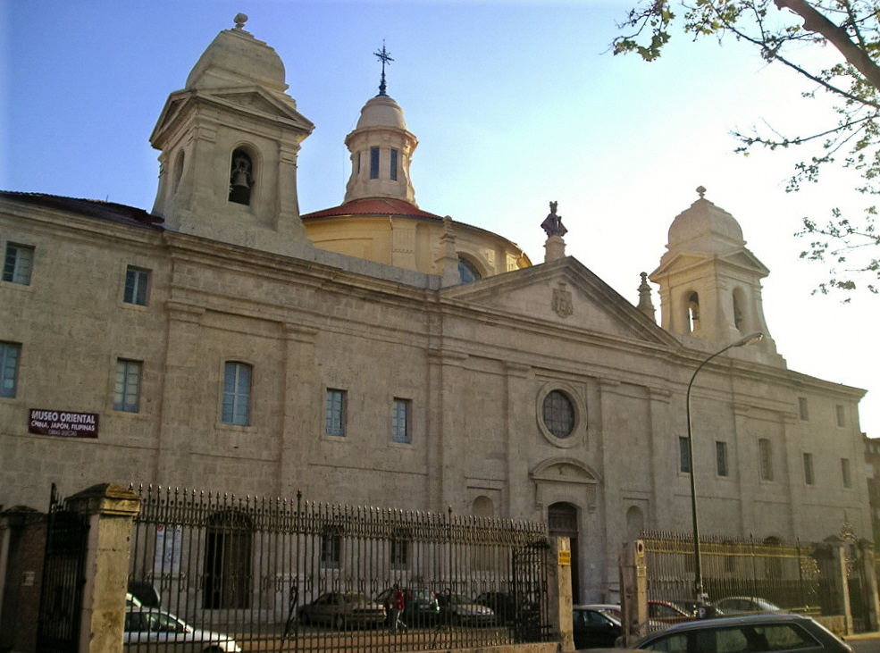 Fachada del convento de los Agustinos-Filipinos en el paseo de Filipinos de Valladolid (España). «El edificio empieza su construcción en 1759 [...]. En 1853 se retoman otra vez los trabajos de construcción y se empieza la iglesia, aunque las obras transcurren muy lentamente. A finales del siglo XIX, bajo la dirección del arquitecto Jerónimo Ortiz de Urbina y siguiendo los planos de Ventura Rodríguez, se construyeron la iglesia, hasta el arranque de la cúpula, y el tercer piso del edificio. En 1924 se cierra la cúpula y en 1927 se concluyen las torres. El interior de la iglesia se decora y en 1930, el edificio es finalizado y se consagra la iglesia el 4 de mayo de ese año. Había tardado la construcción casi 171 años.» -wikipedia